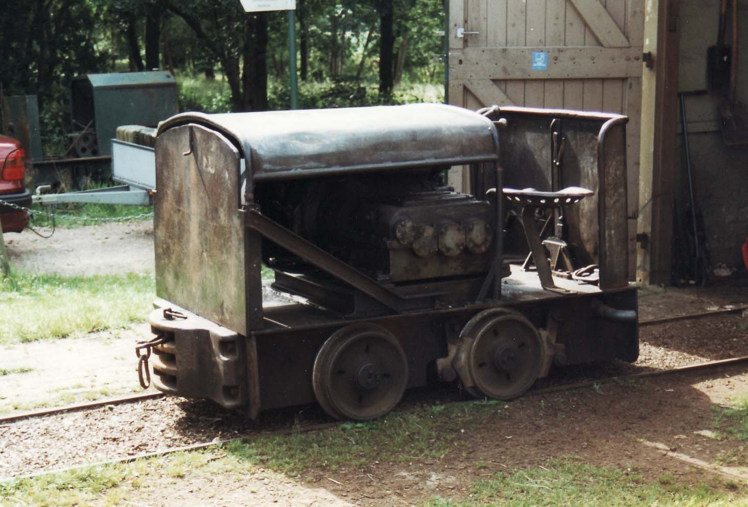 Smalspoorlocomotief Hatlapa